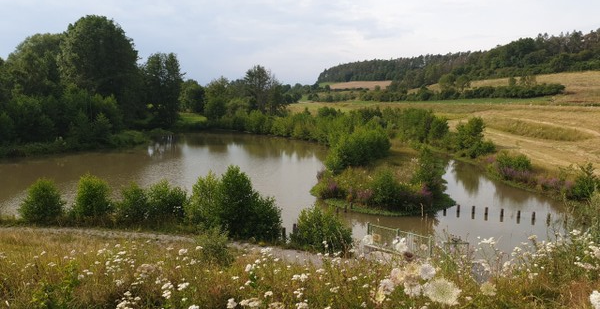 Staudamm Steinach